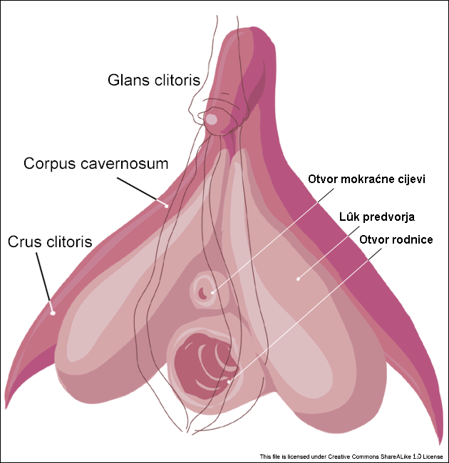 Nutarnja anatomija čovječje vulve, s pokrovnom kožicom klitorisa i malim usnama koje su naznačene crtama.